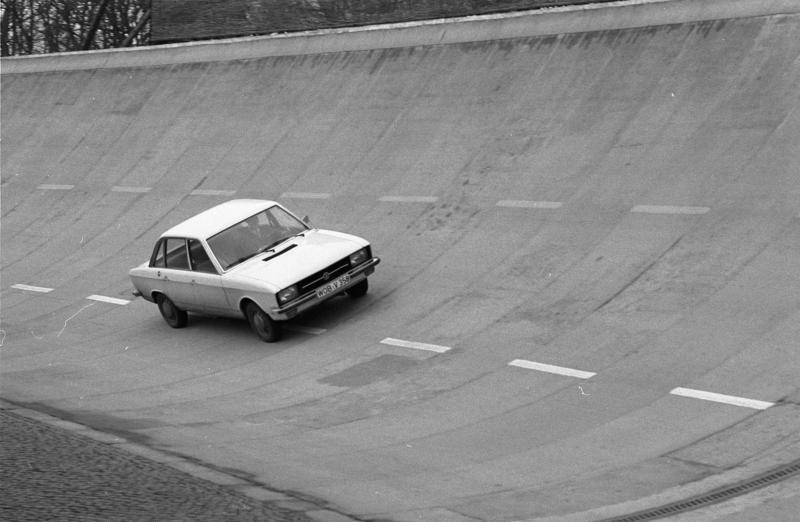 VW-Werk, Wolfsburg Forschung und Entwicklungsabteilung